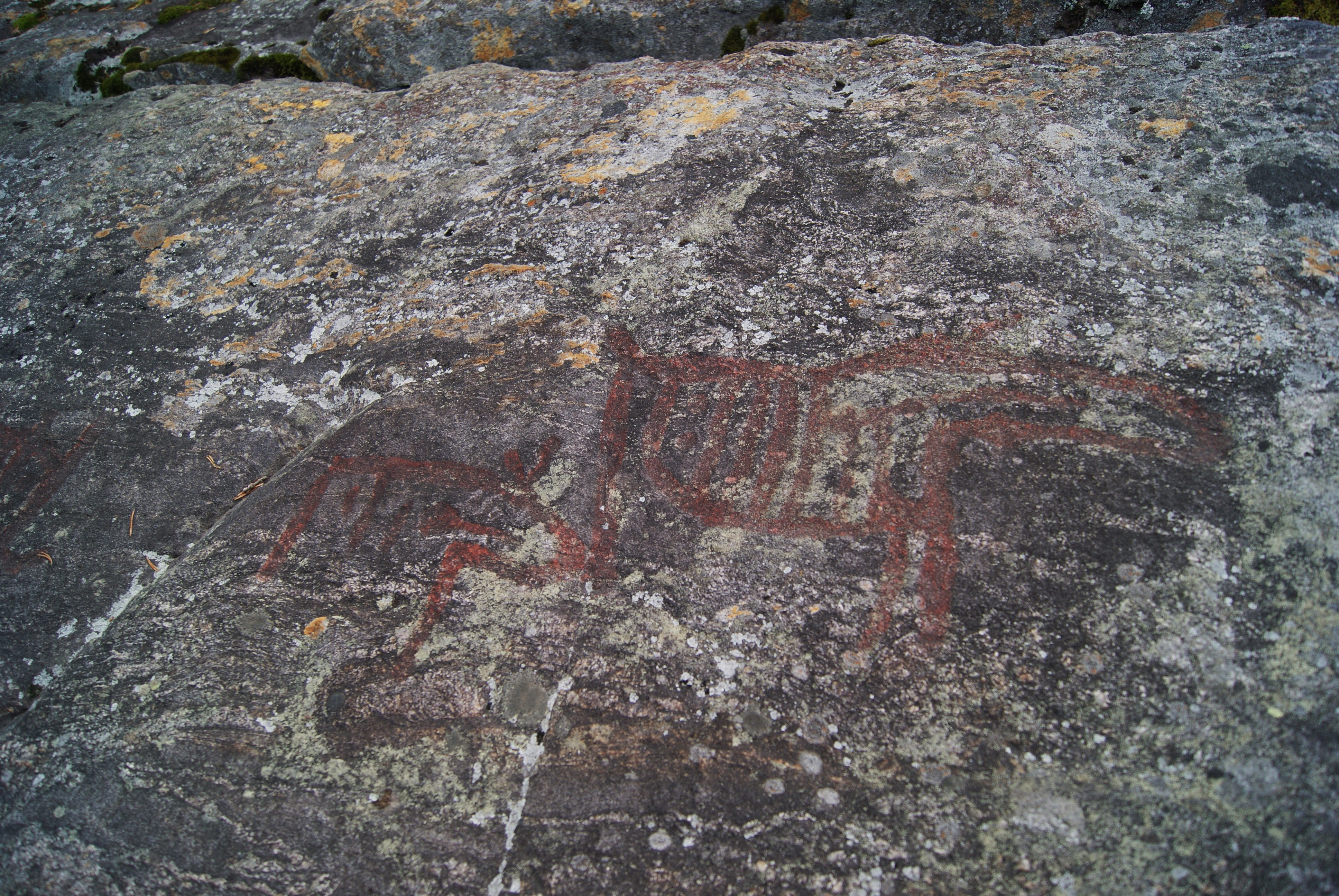 Umeå stad 365:1